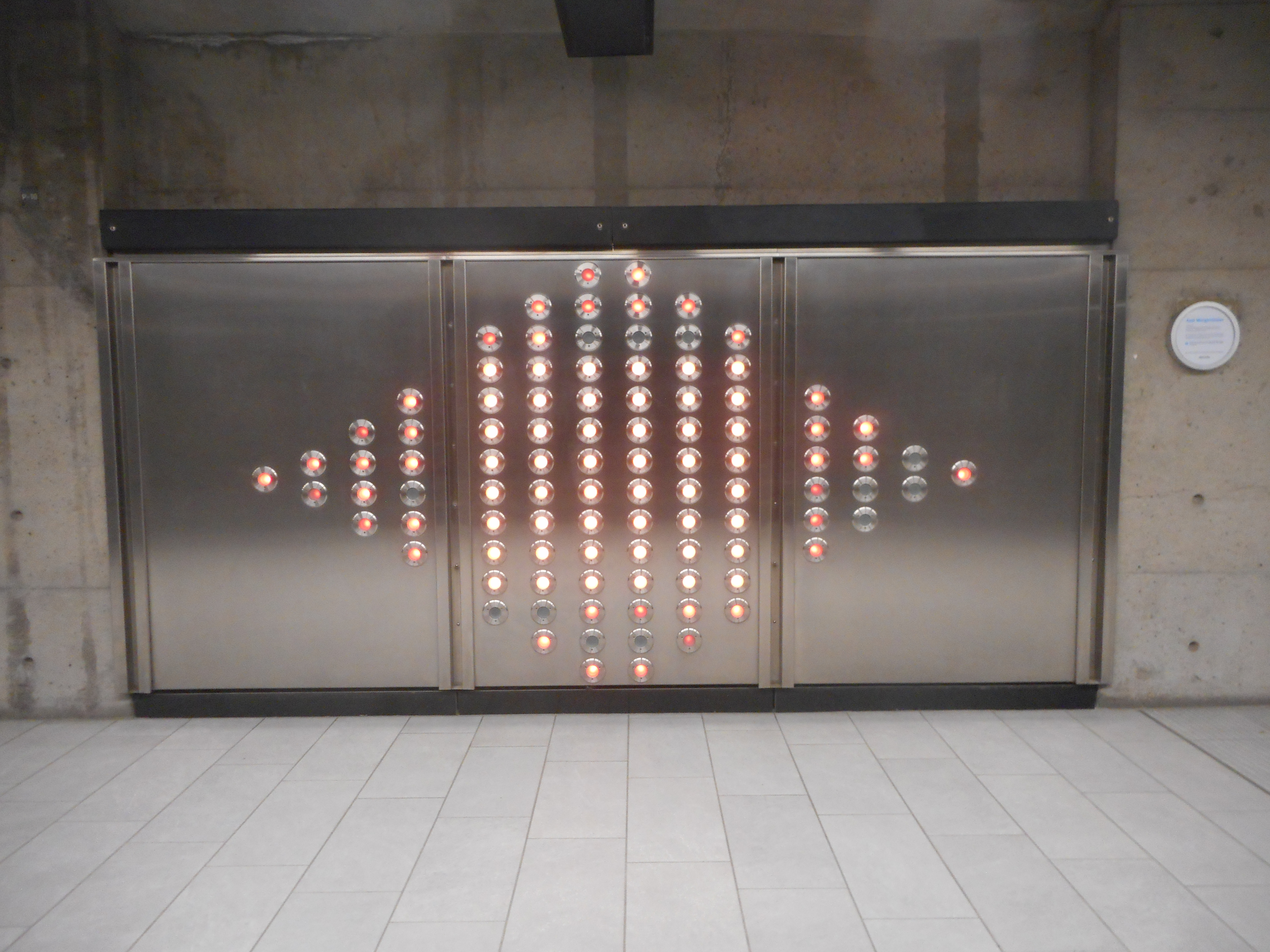 .98 est une oeuvre d'Axel Morgenthaler située à la station de métro Henri-Bourassa, réalisée en 2007.